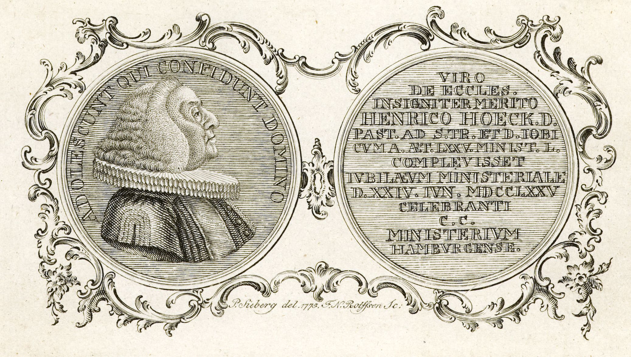 Bildnis von Heinrich Hoeck